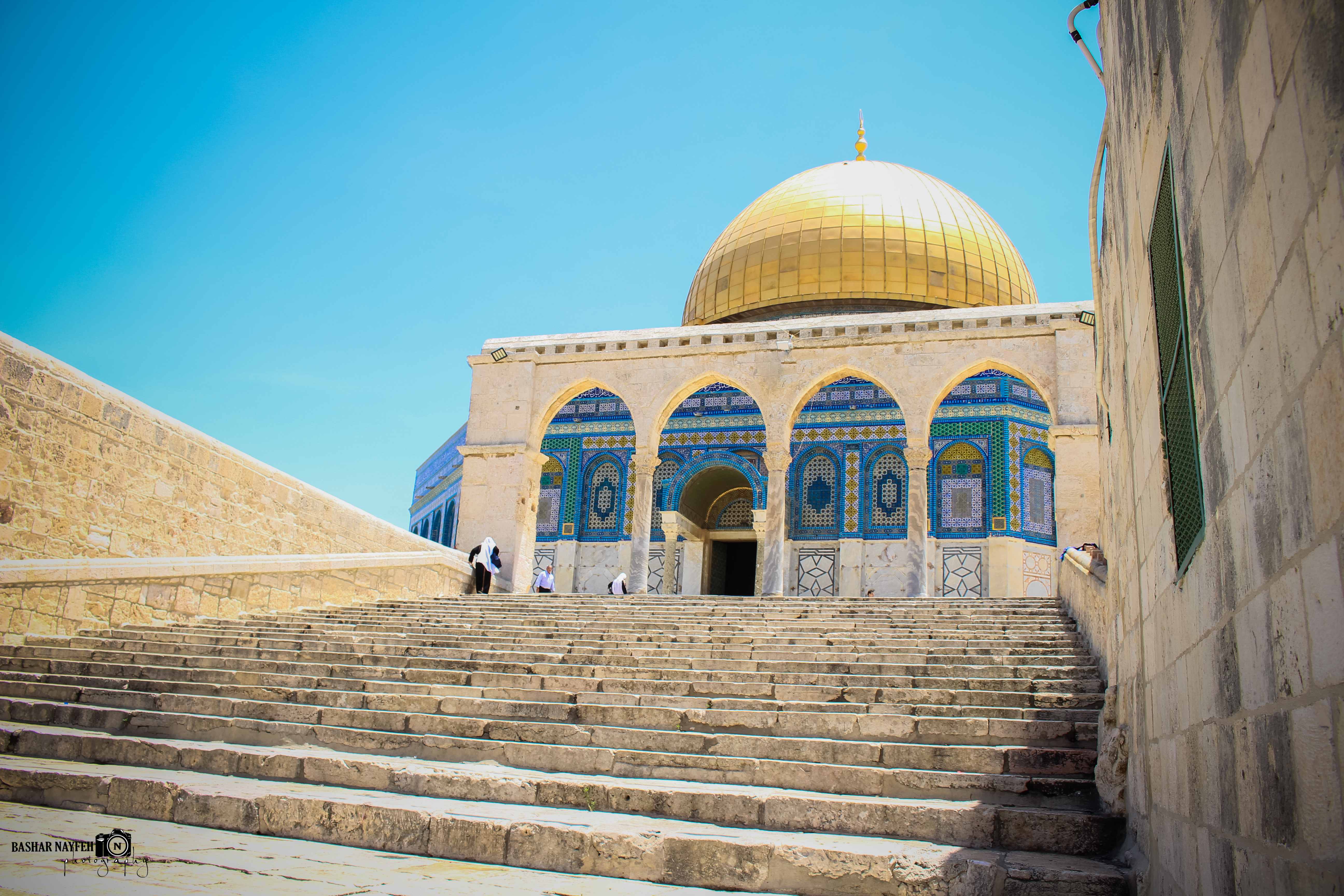 تبين الصورة أحد المداخل لقبة الصخرة في المسجد الأقصى المبارك-القدس